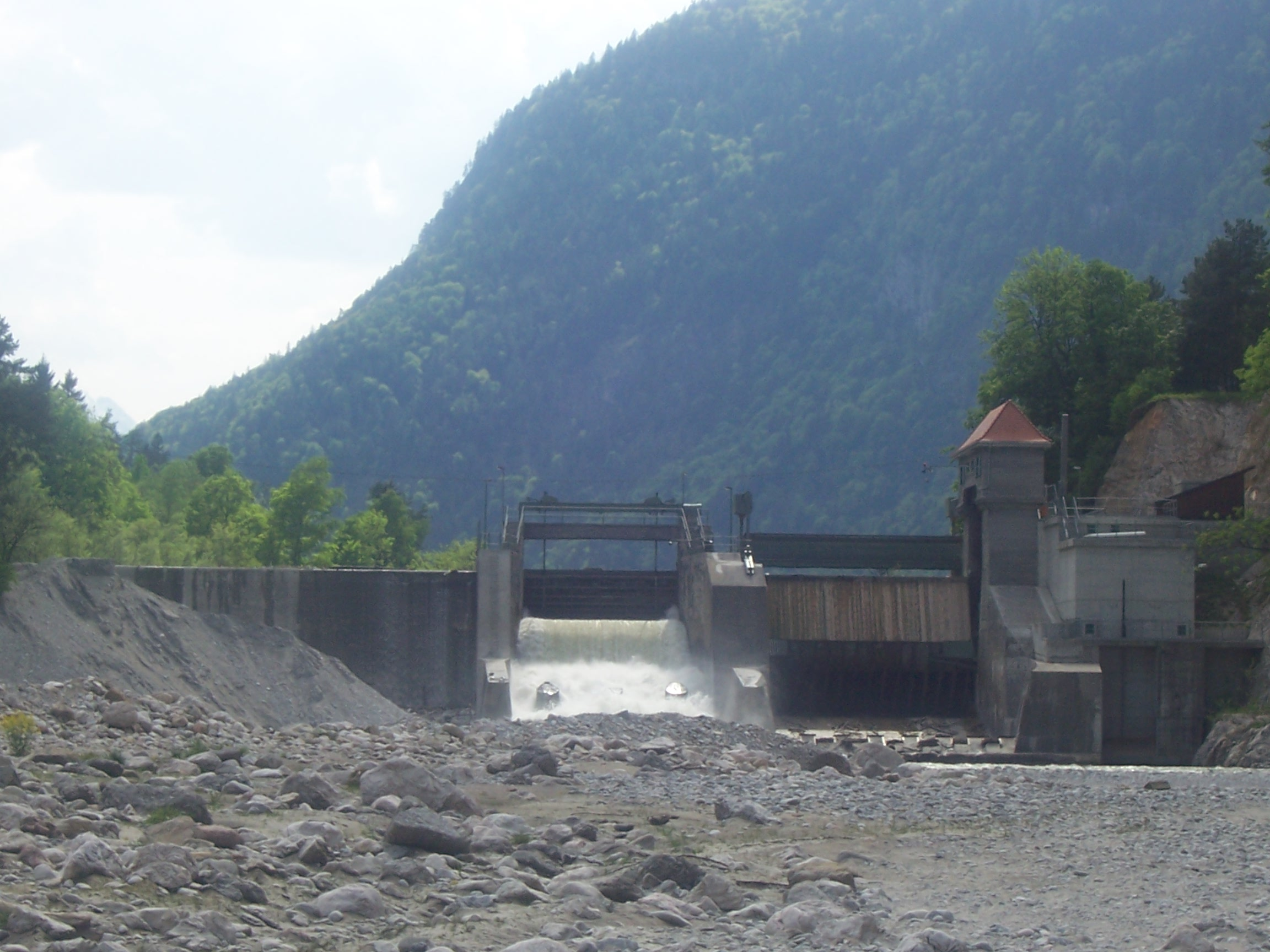 Staumauer des Saalachsees Bei Verwendung bitte ich hier um einen Hinweis, wo das Foto genutzt wird.